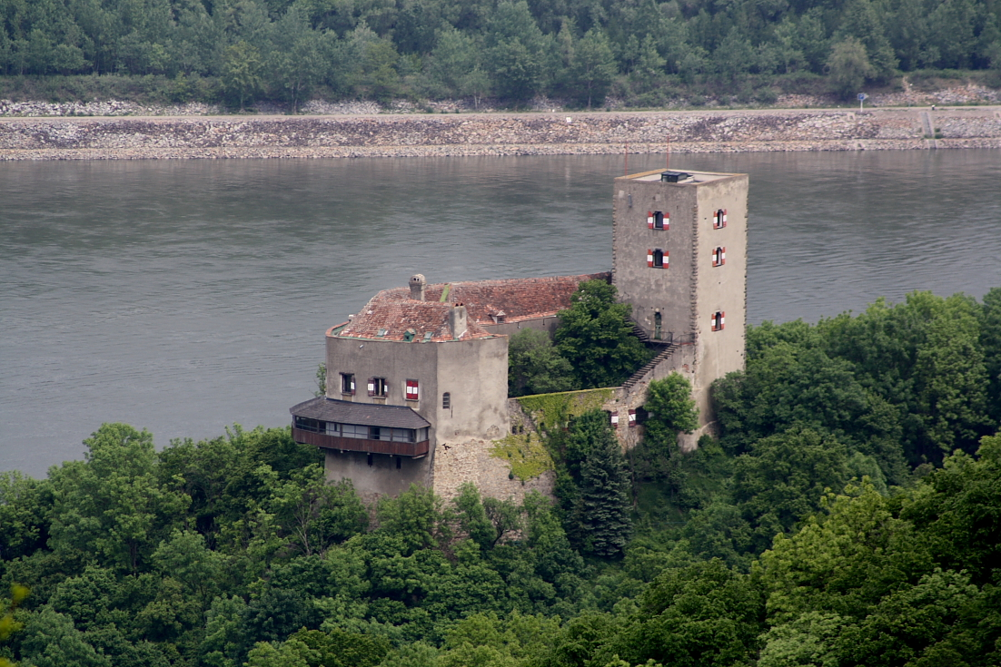 Burg Greifenstein, Südwestansicht (von der Tempelbergwarte); im Hintergrund die Donau.